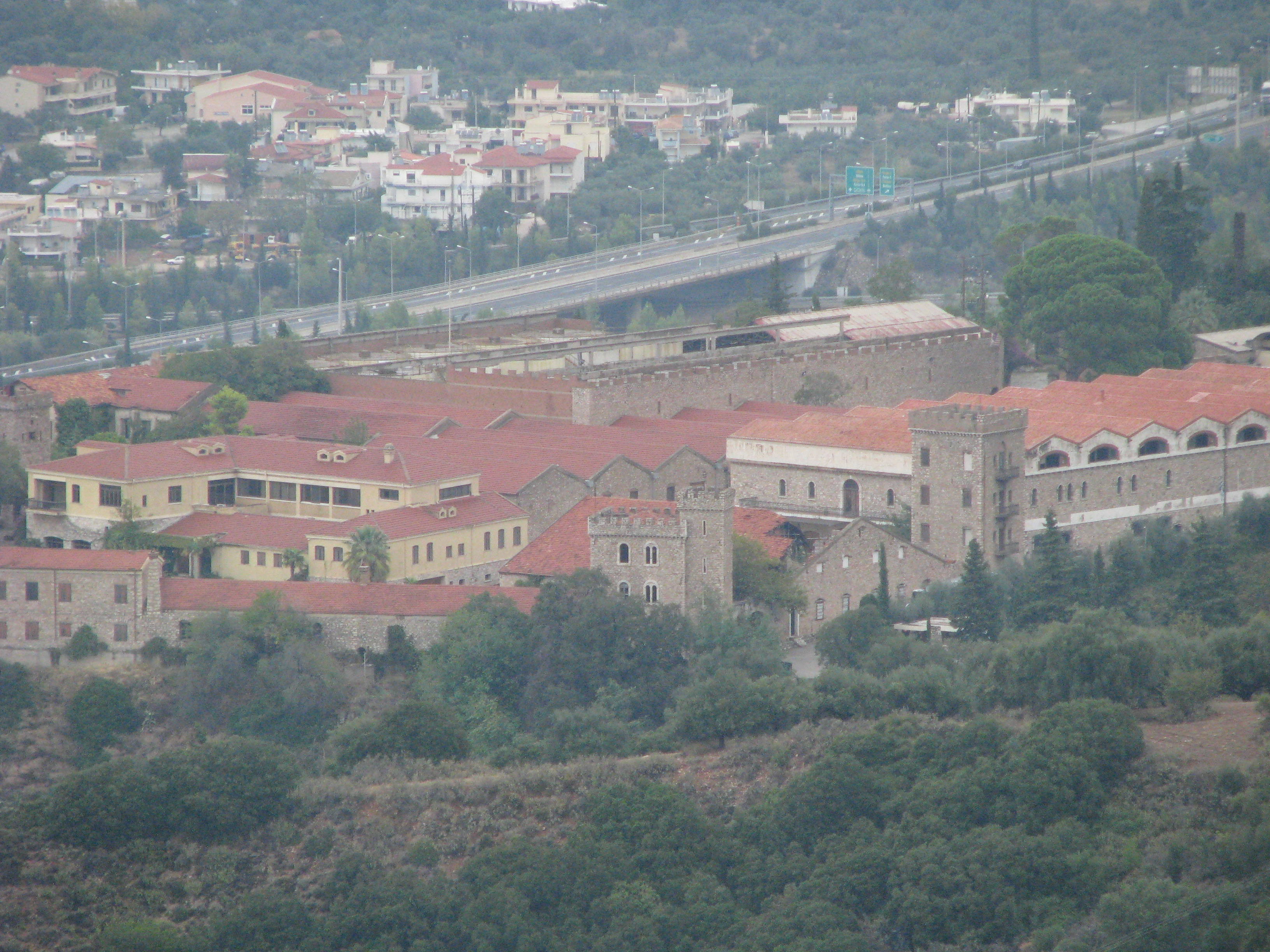 Οινοποιείο ΑΧΑΪΑ ΚΛΑΟΥΣ«Οινοποιείο ΑΧΑΪΑ ΚΛΑΟΥΣ»